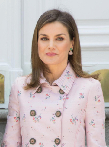 Visita Oficial del Presidente de la República de México a España.